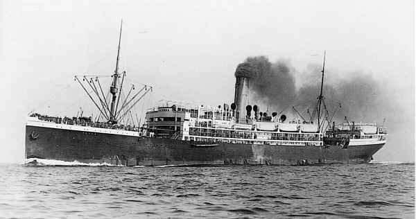 Der Passagierdampfer YORCK des NDL